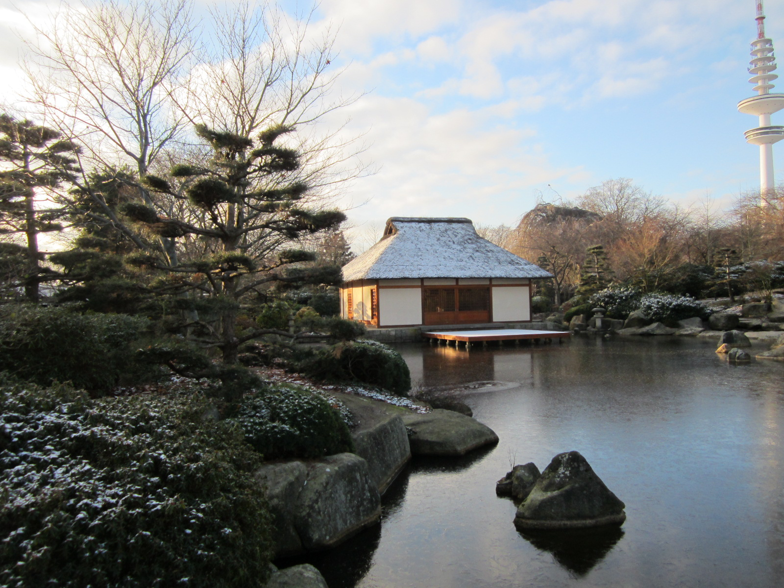 Teehaus im japanischen Garten, Winter 2012 (mit Fernsehturm)